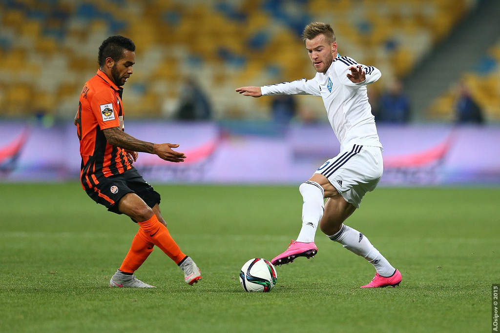 16.10.2015 г.Киев. НСК "Олимпийский". 11-й тур Лиги Пари-Матч. Динамо Киев - Шахтер Донецк - 0:3